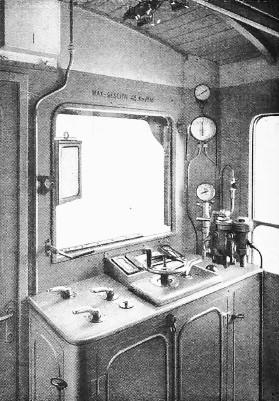 Führerstand des Dieseltriebwagens BCFm 2/4 der Appenzeller Bahn (AB)